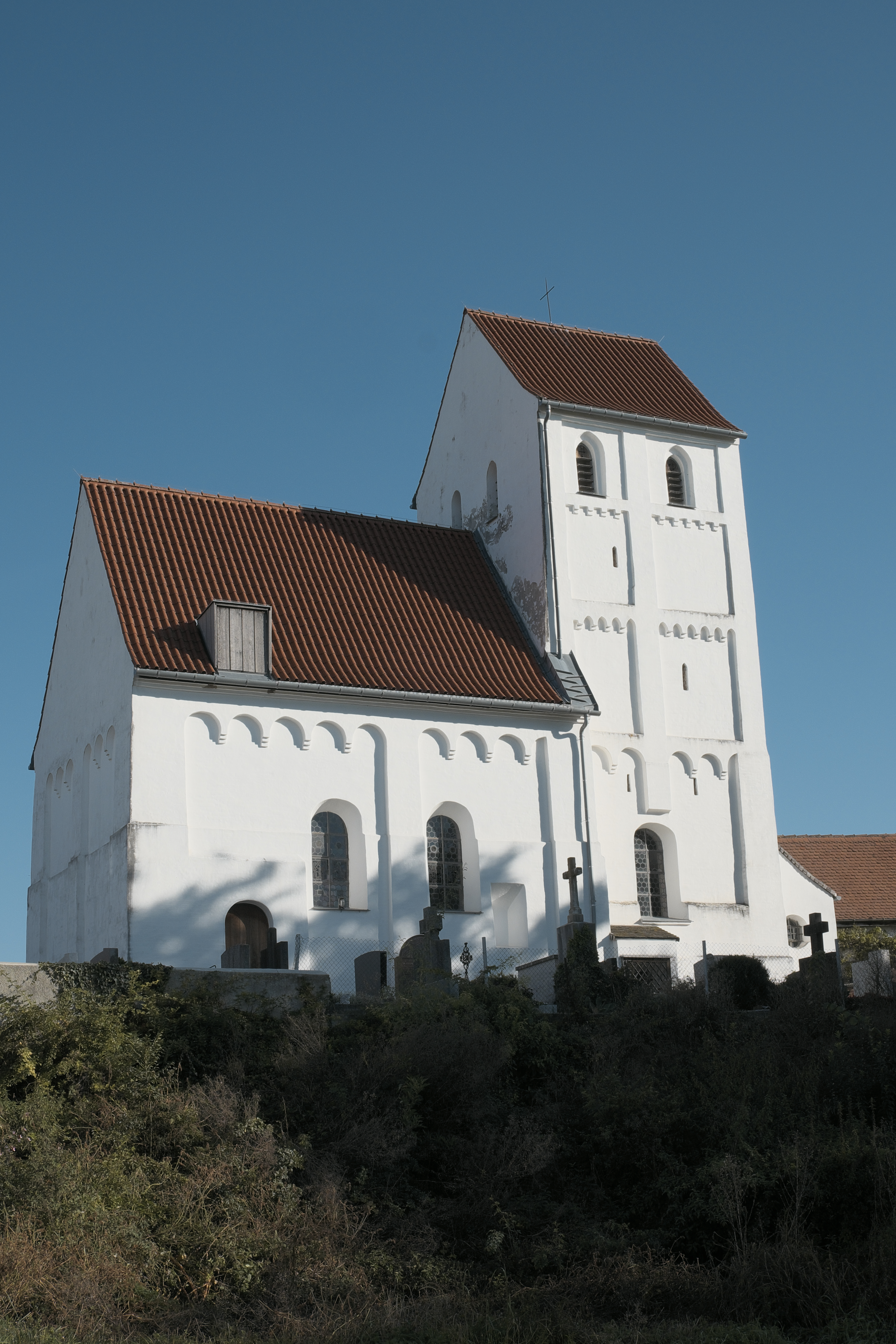 Katholische Filialkirche St. Urban in Palsweis (Bergkirchen) im Landkreis Dachau (Bayern/Deutschland)